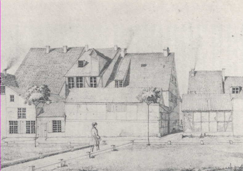 Rückansicht des Hauses von Adolph Gottlieb Friedrich in Greifswald von der Nikolaikirche gesehen. Geburtshaus von Caspar David Friedrich.